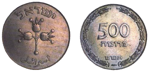 Аверс и реверс израильской монеты 50 прут 1952года выпуска